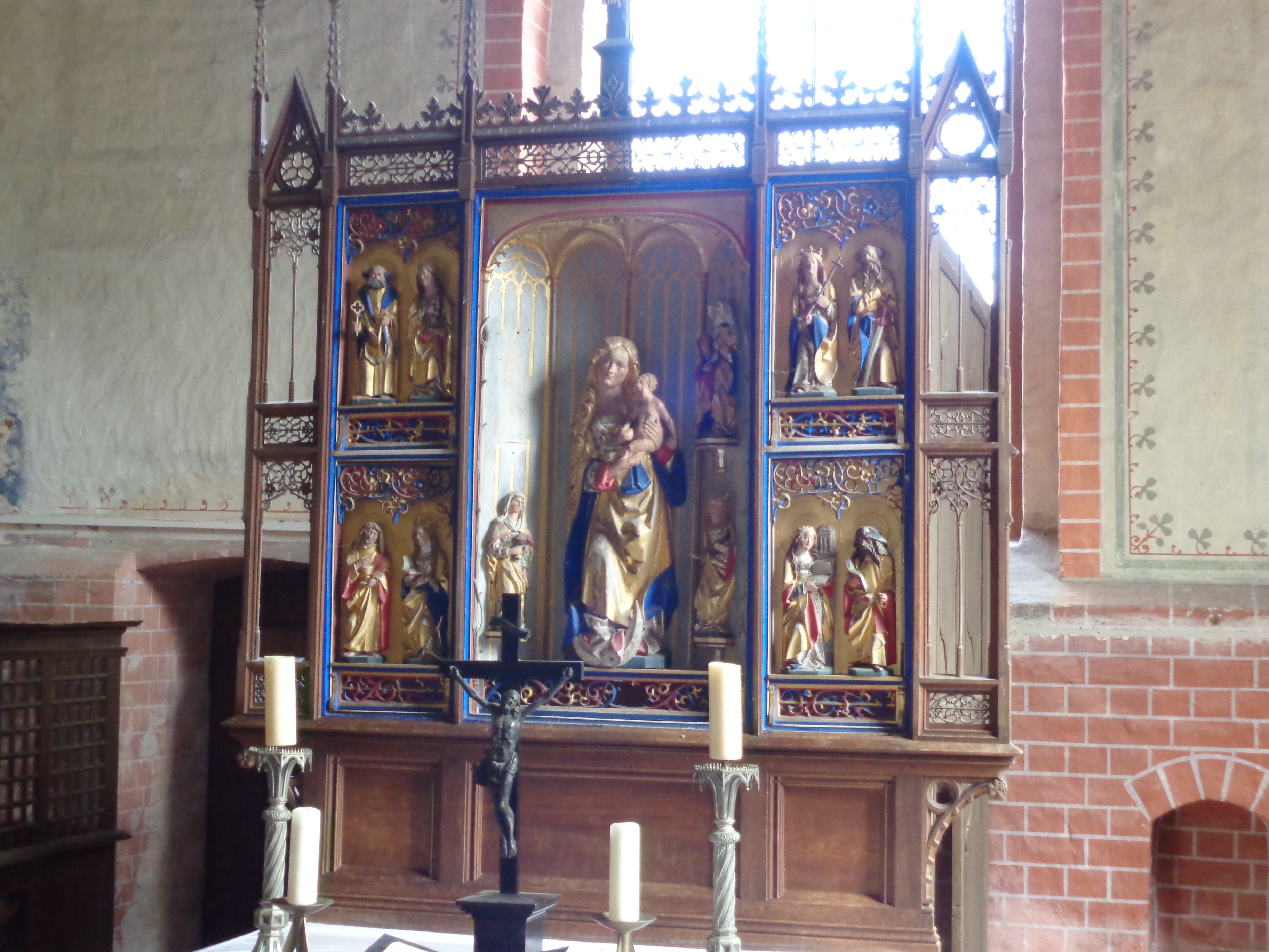 Fotografie des Altars in der Dorfkirche Dobbin bei Krakow am See, Mecklenburg